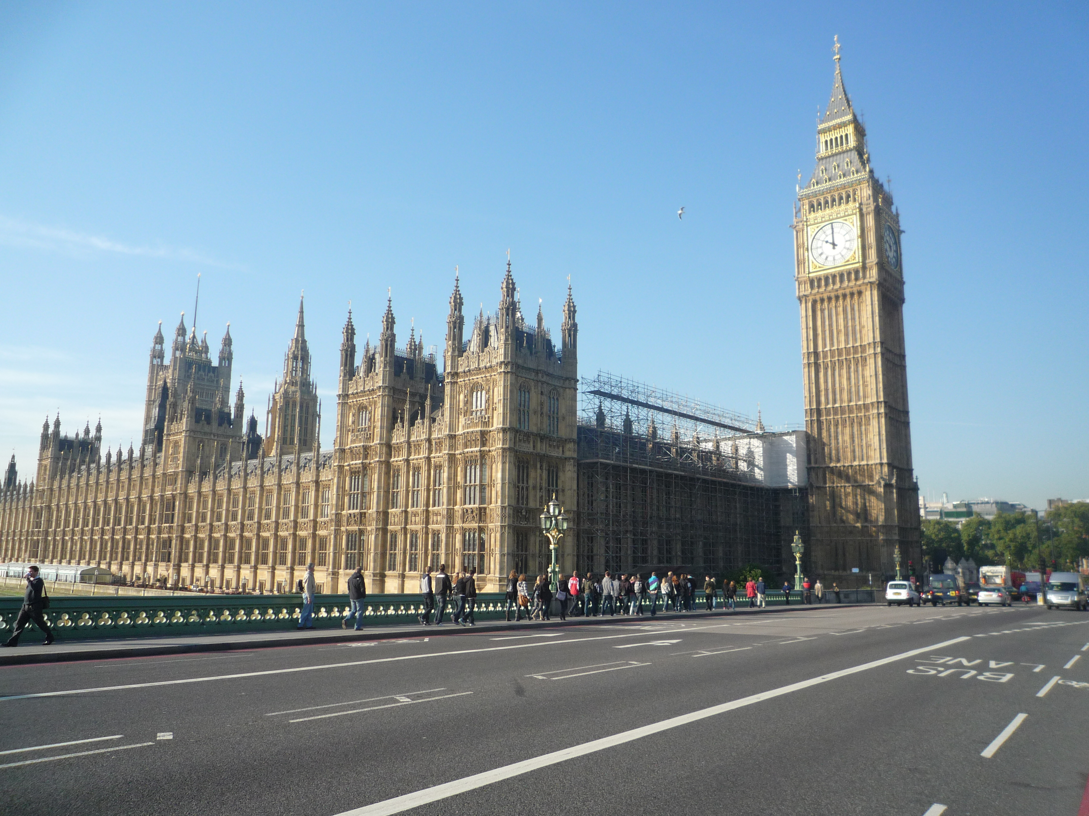 Big Ben,Westminster Bridge Road, Westminster, London